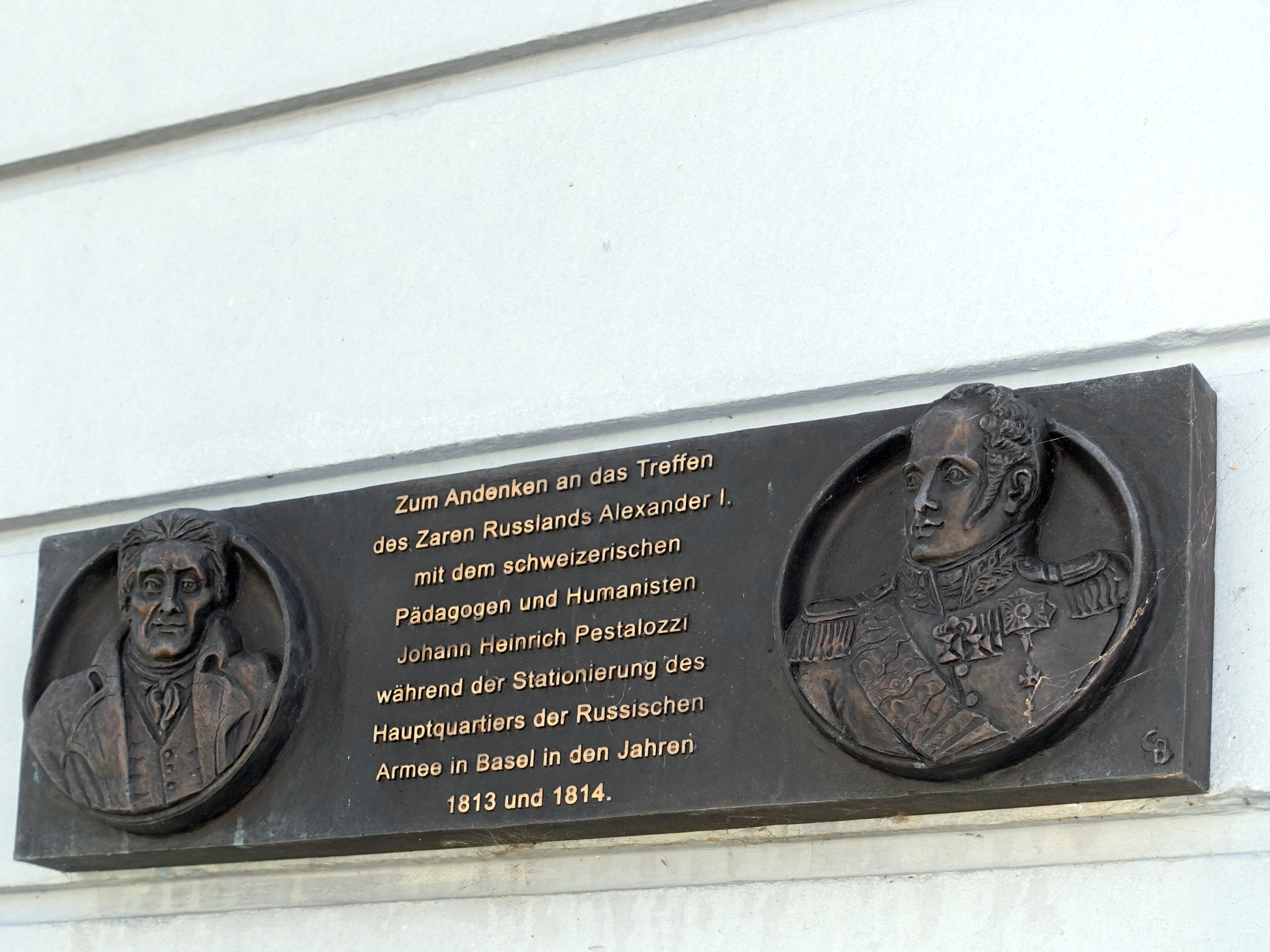 Johann Heinrich Pestalozzi (1746–1827) Pädagoge, Gedenktafel, Standort, Blumenrain 24 in Basel. Inschrift: Zum Andenken an das treffen des Zaren Russlands Alexander I. mit dem schweizerischen Pädagogen und Humanisten Johann Heinrich Pestalozzi während der Stationierung des Hauptquartiers der russischen Armee in Basel in den Jahren 1813 und 1814.